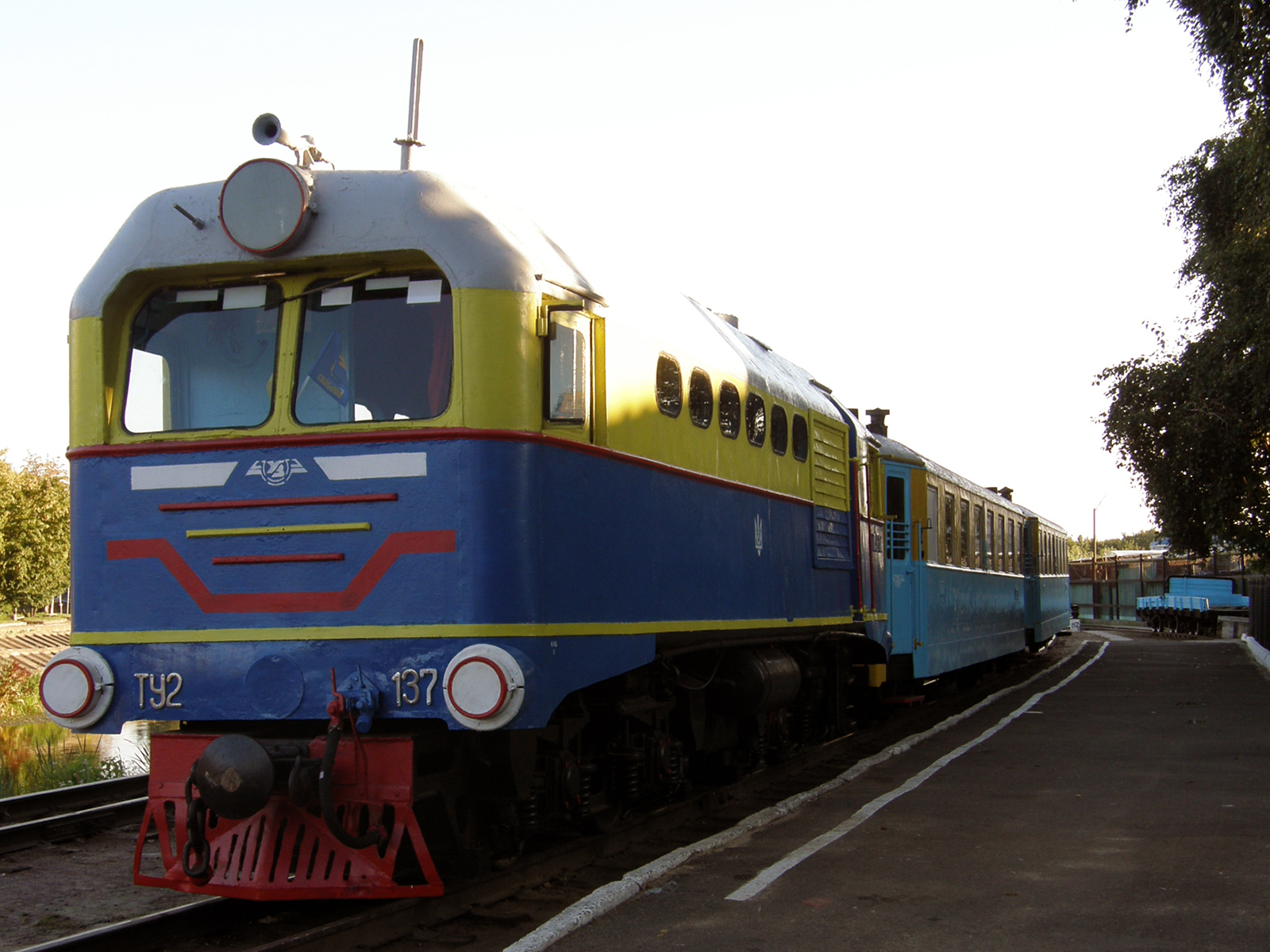 ТУ2 на Ровенской детской железной дороге